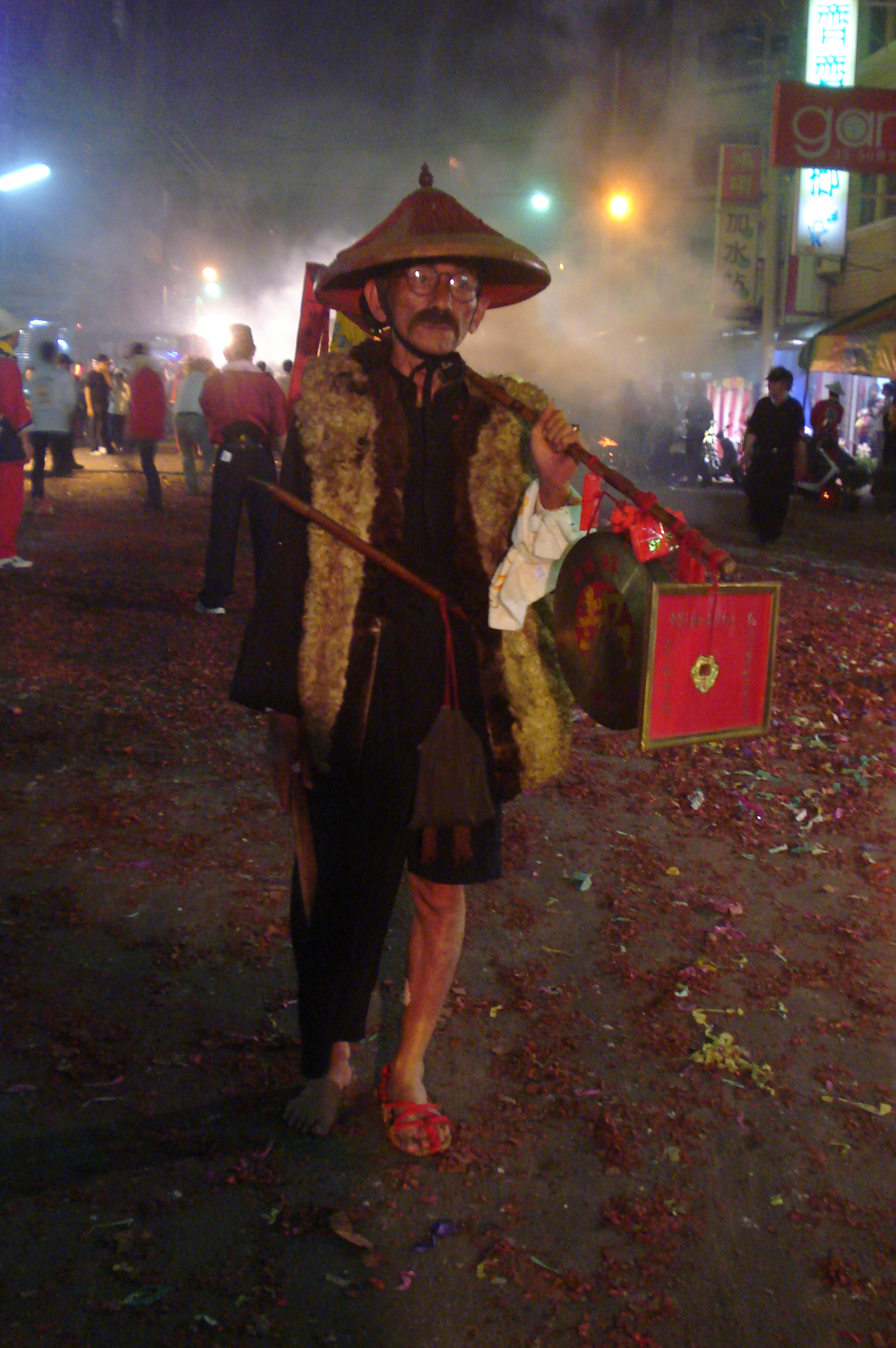 朝天宮報馬仔